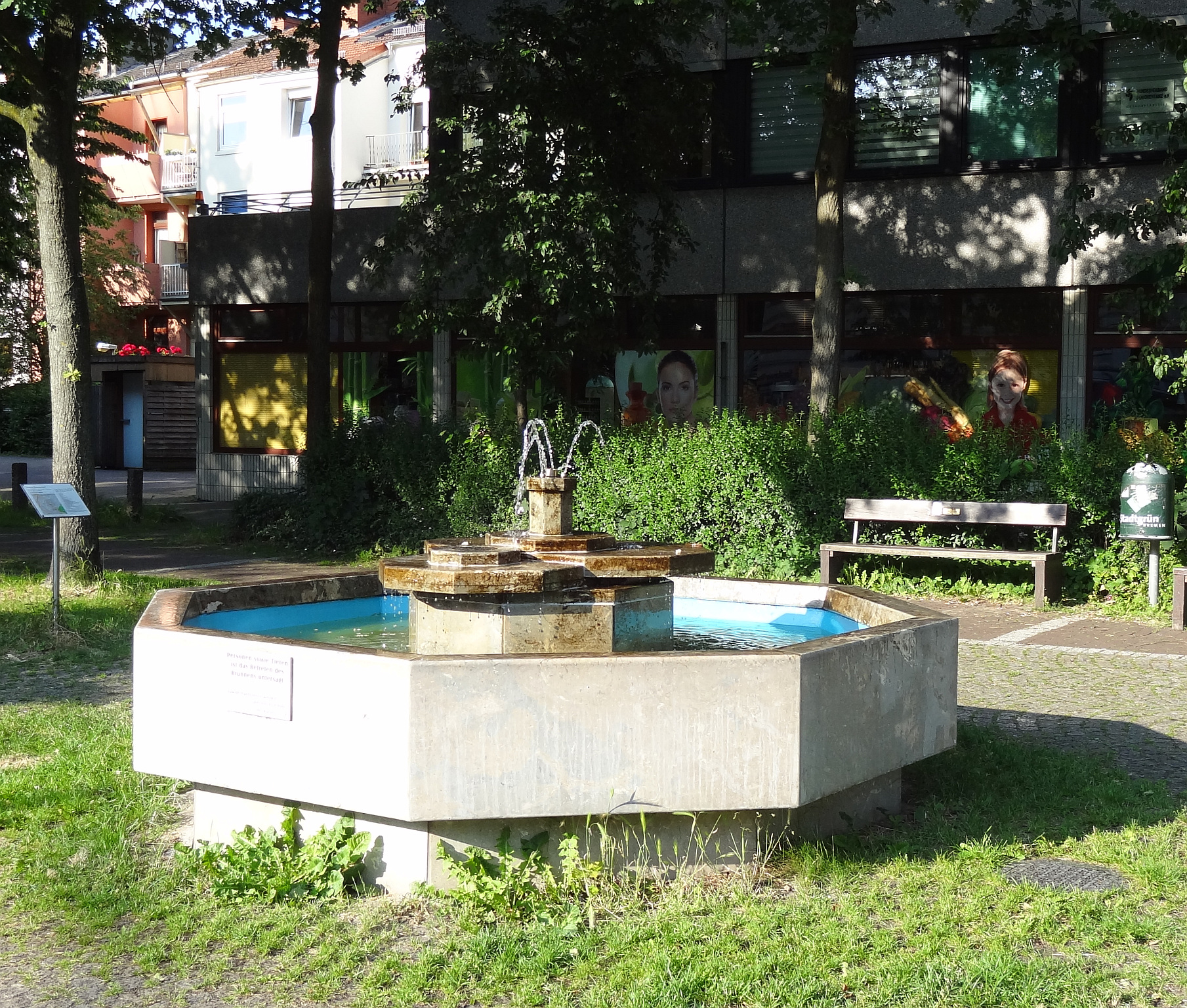 Brunnen am Jan-Reiners-Denkmal in Findorff